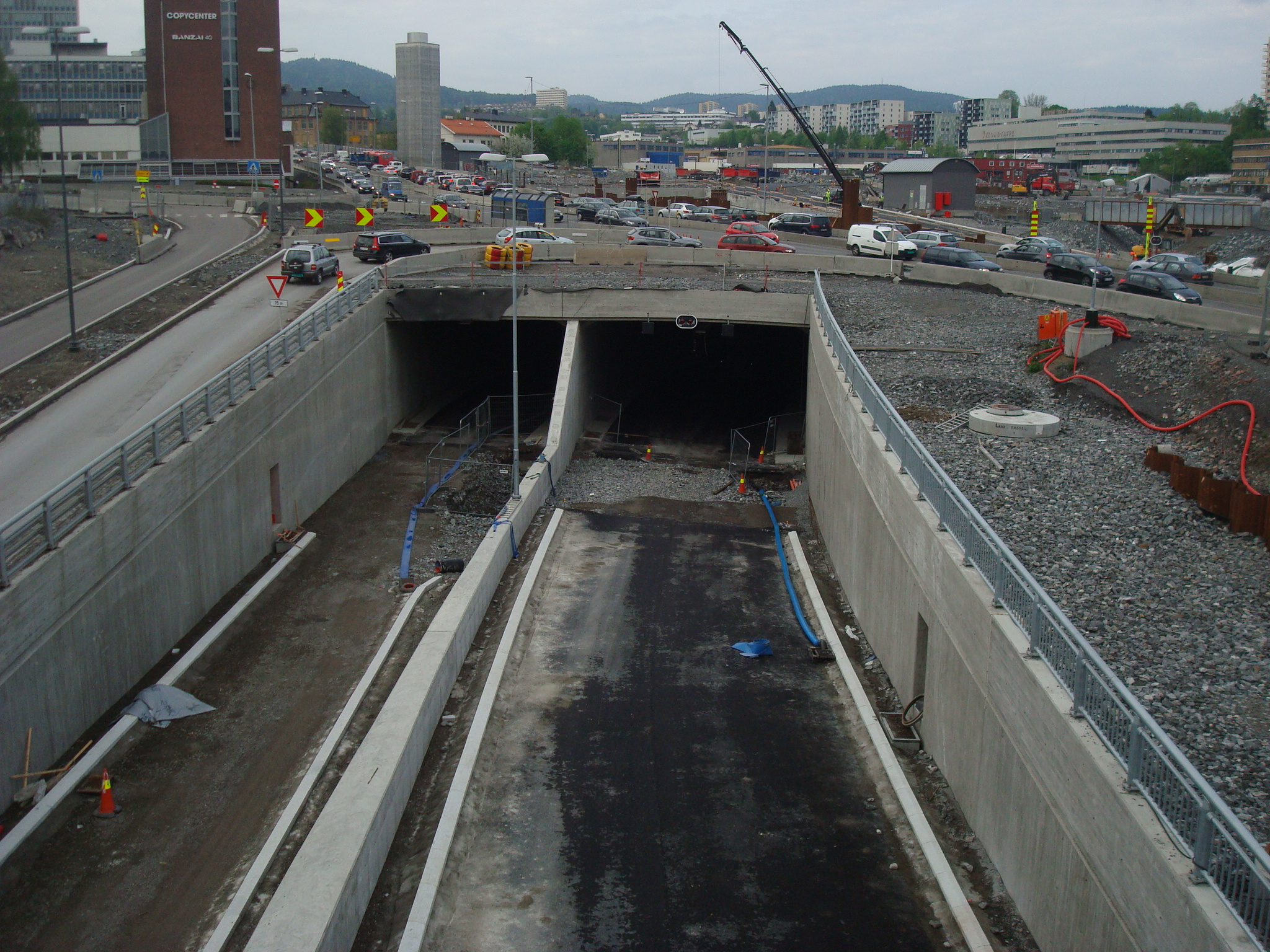 Økerntunnelen i Oslo under bygging i mai 2013.